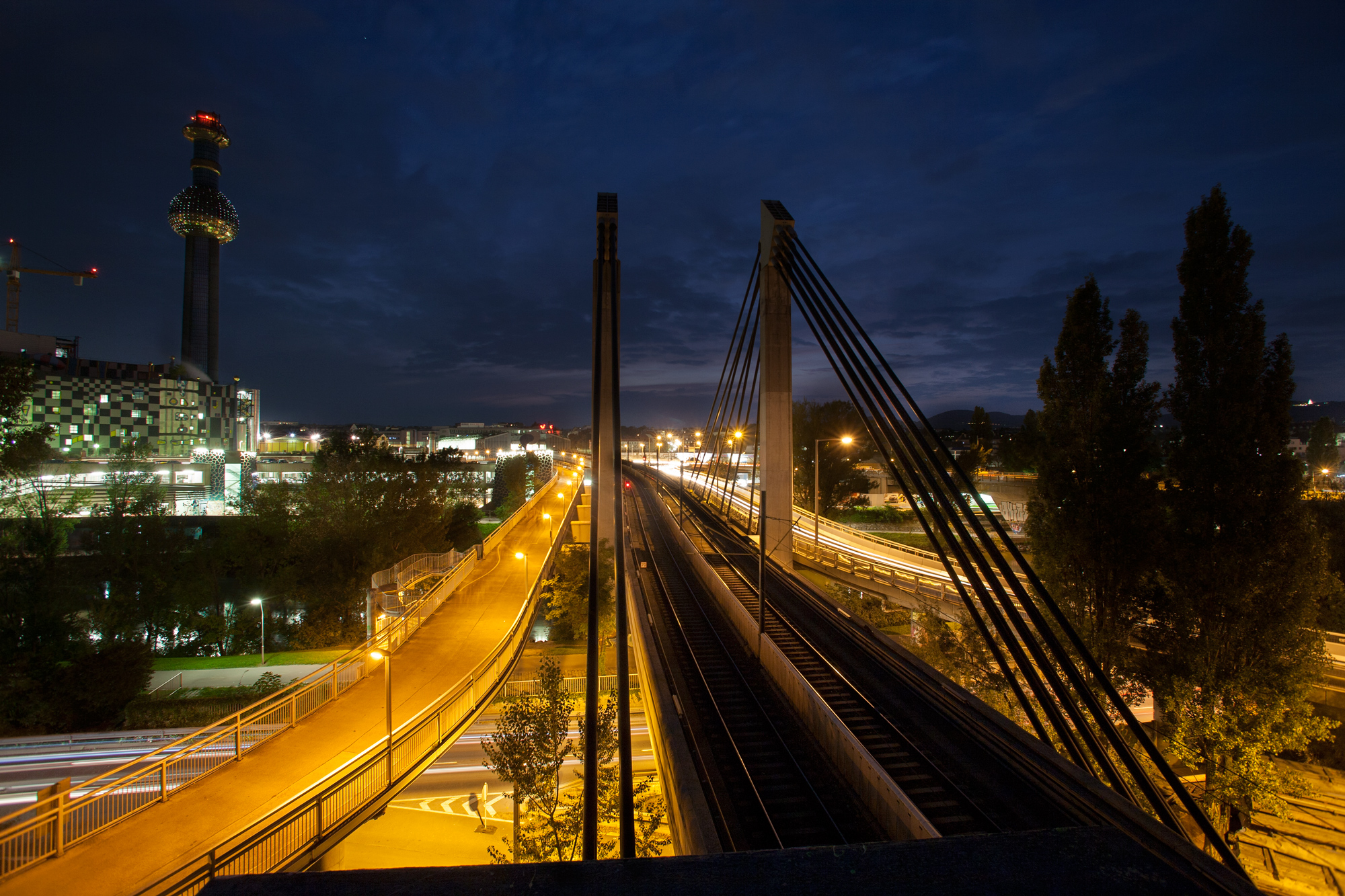 Spittelauer Brücke mit Blick auf die Müllverbennungsanlage